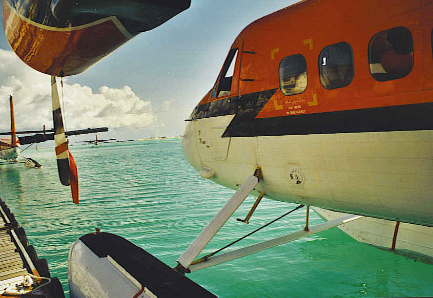 Maldivian Air Taxi (MAT) / Aufnahmeort: Flughafen Male